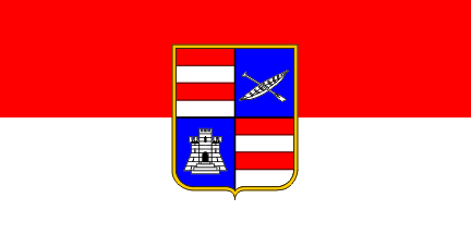 Flag of Dubrovnik-Neretva County